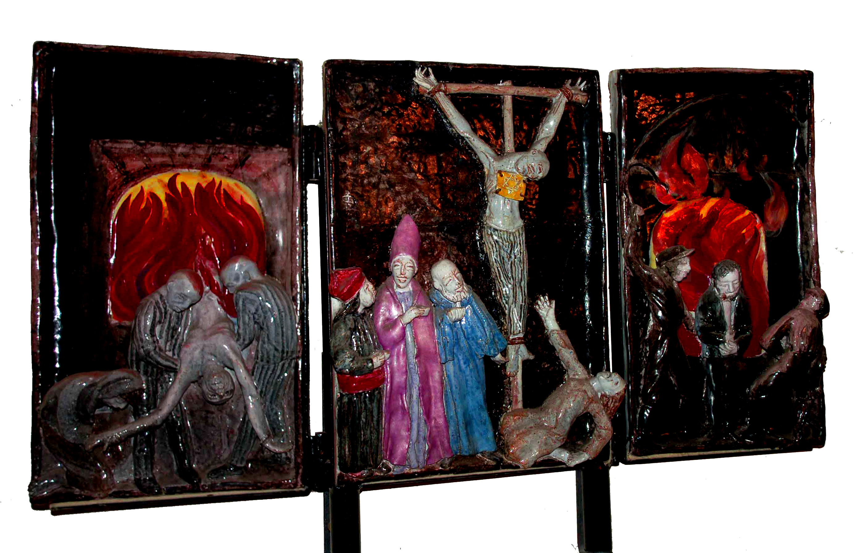 „Triptychon für Auschwitz“ by Doris Pollatschek, St.-Annen-Church.BerlinDahlem.inside